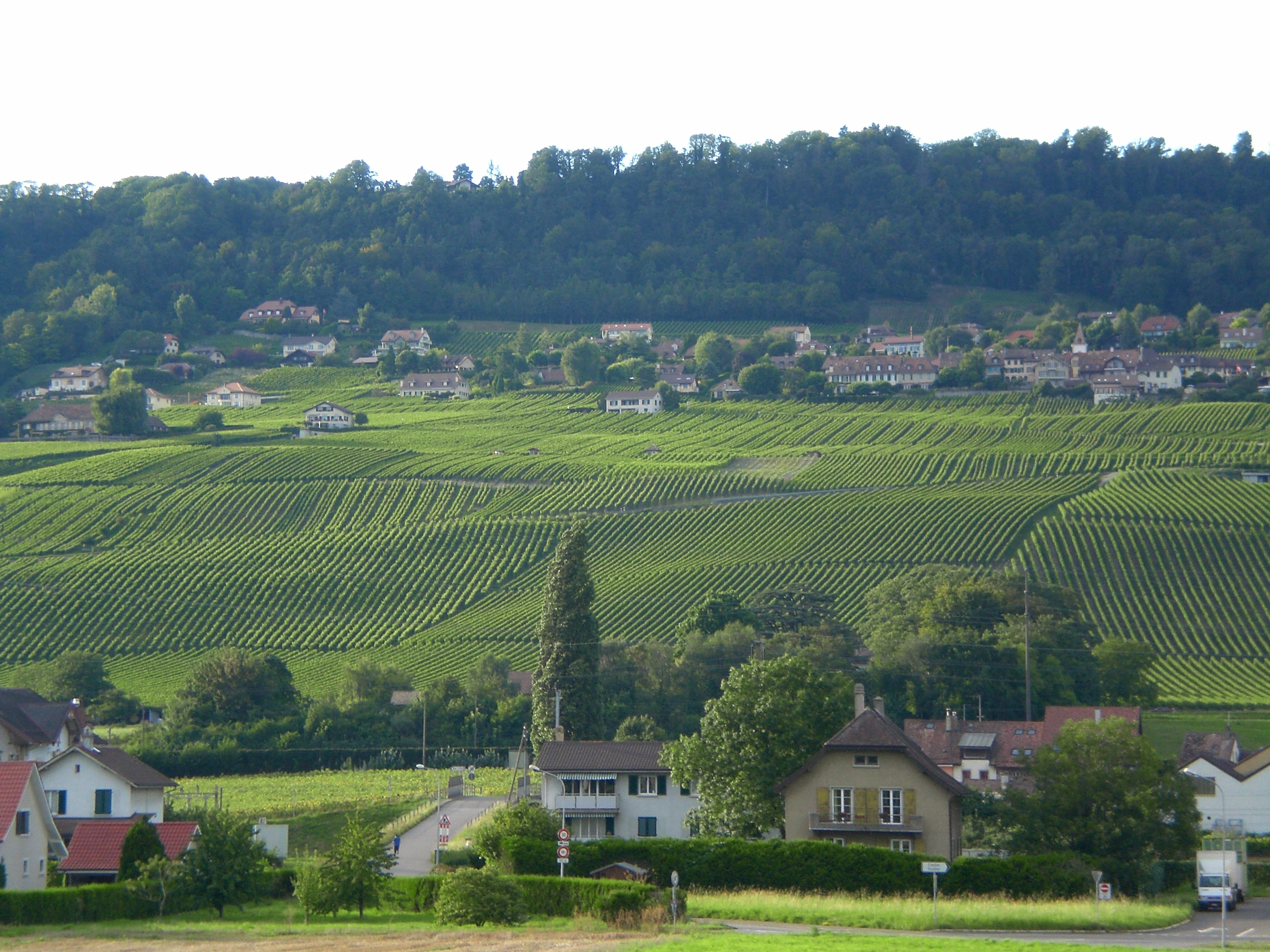 Vue panoramique sur la commune de Bougy-Villars depuis Perroy